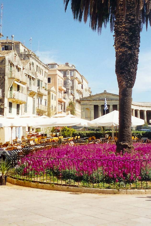 D'Esplanade zu Korfu.